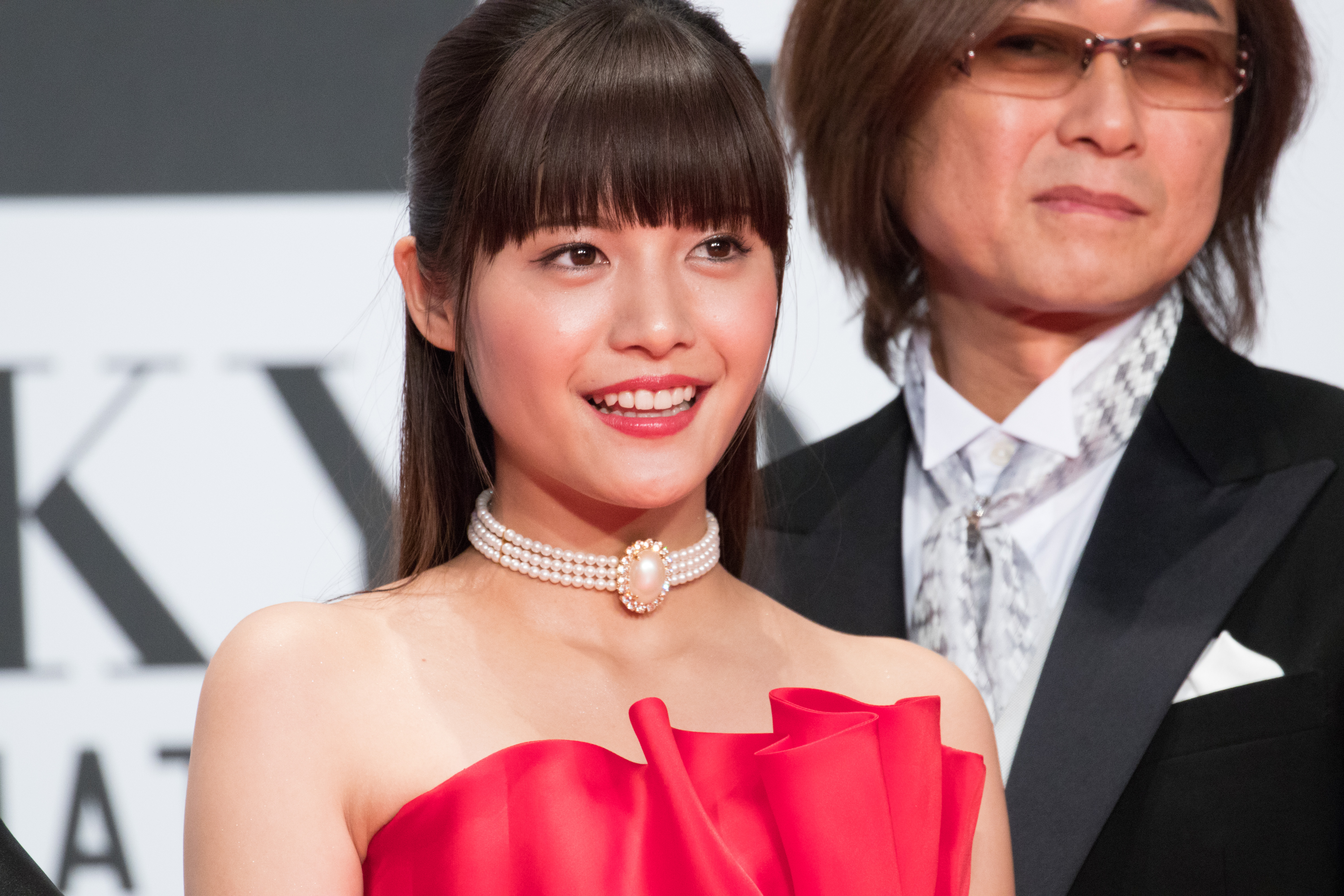 第29回 東京国際映画祭 オープニングセレモニー 美沙玲奈 (イタズラなKiss THE MOVIE ～ハイスクール編～)